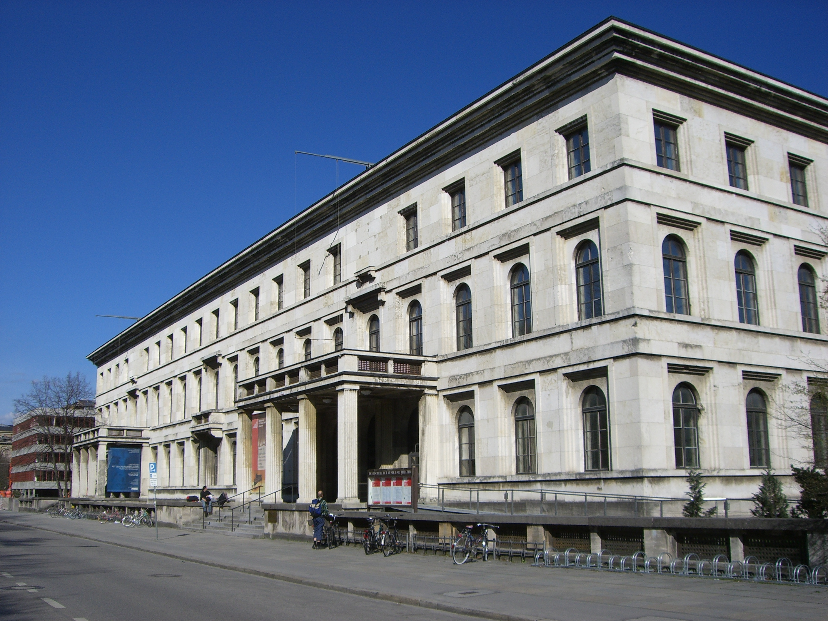 München: Hochschule für Musik und Theater